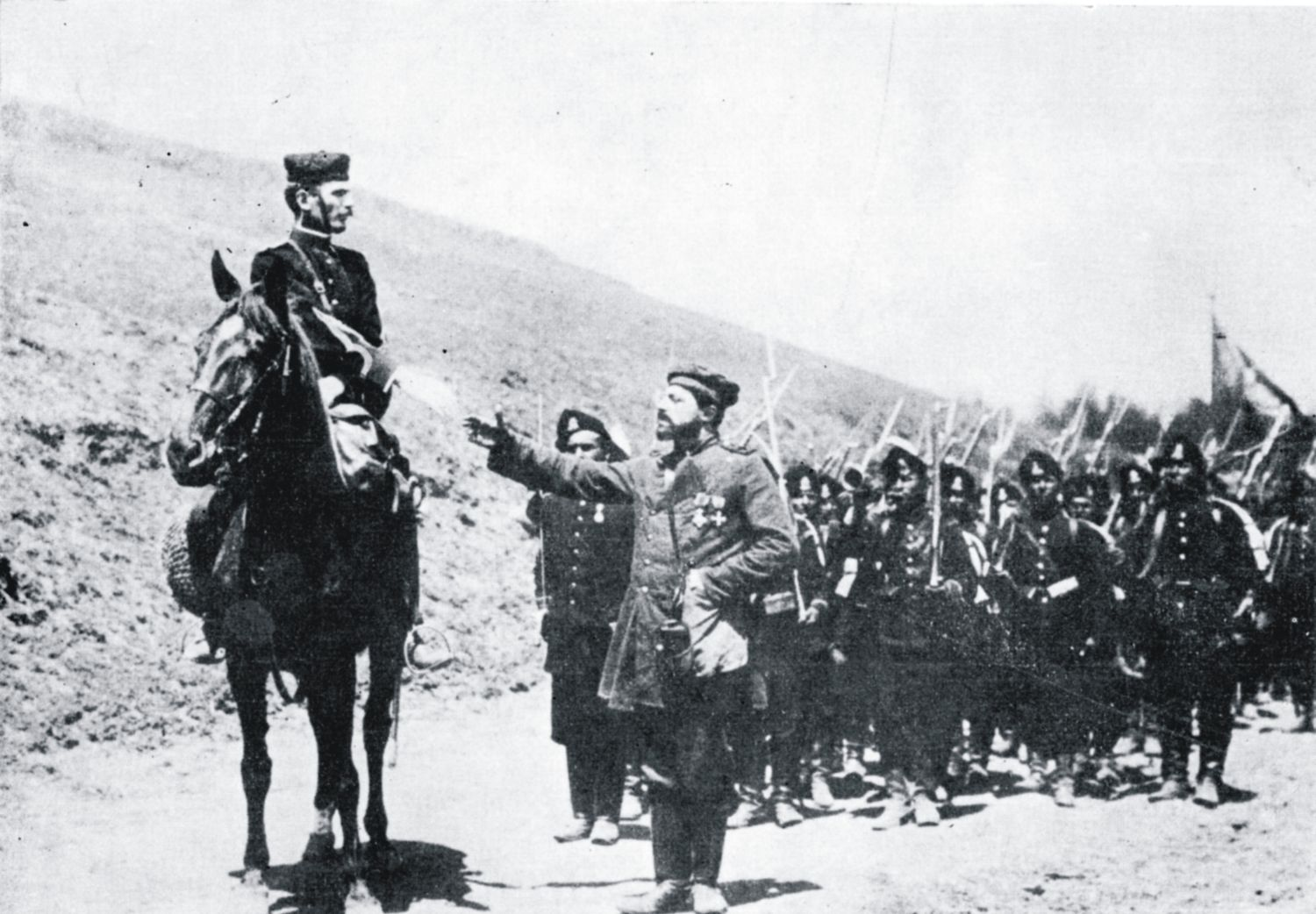 Frame from Independenţa României film (1912). Russian company honouring Peneş Curcanul for his bravery.